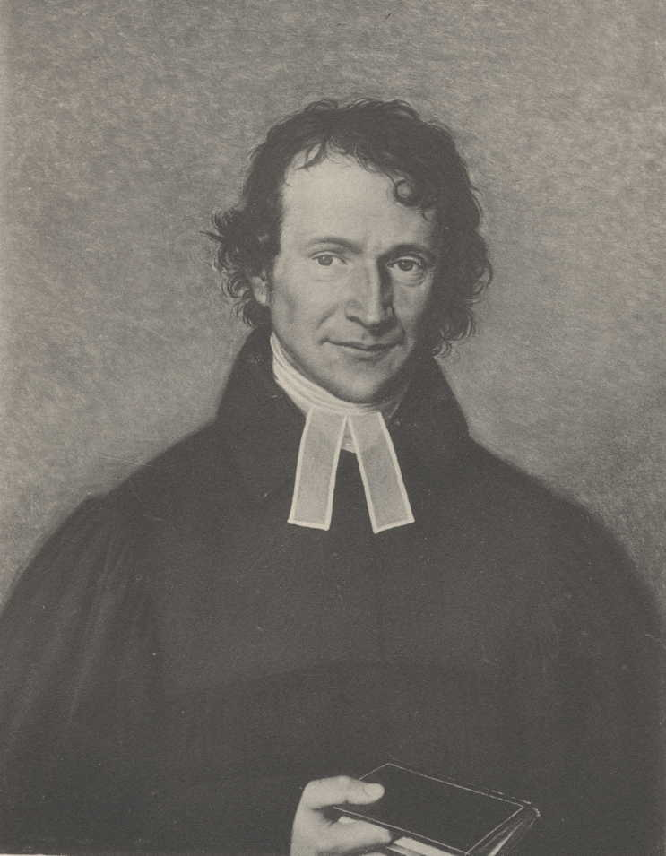 Bildnis des Greifswalder Theologie-Professors August Gottlob Ferdinand Schirmer (1827–1863)